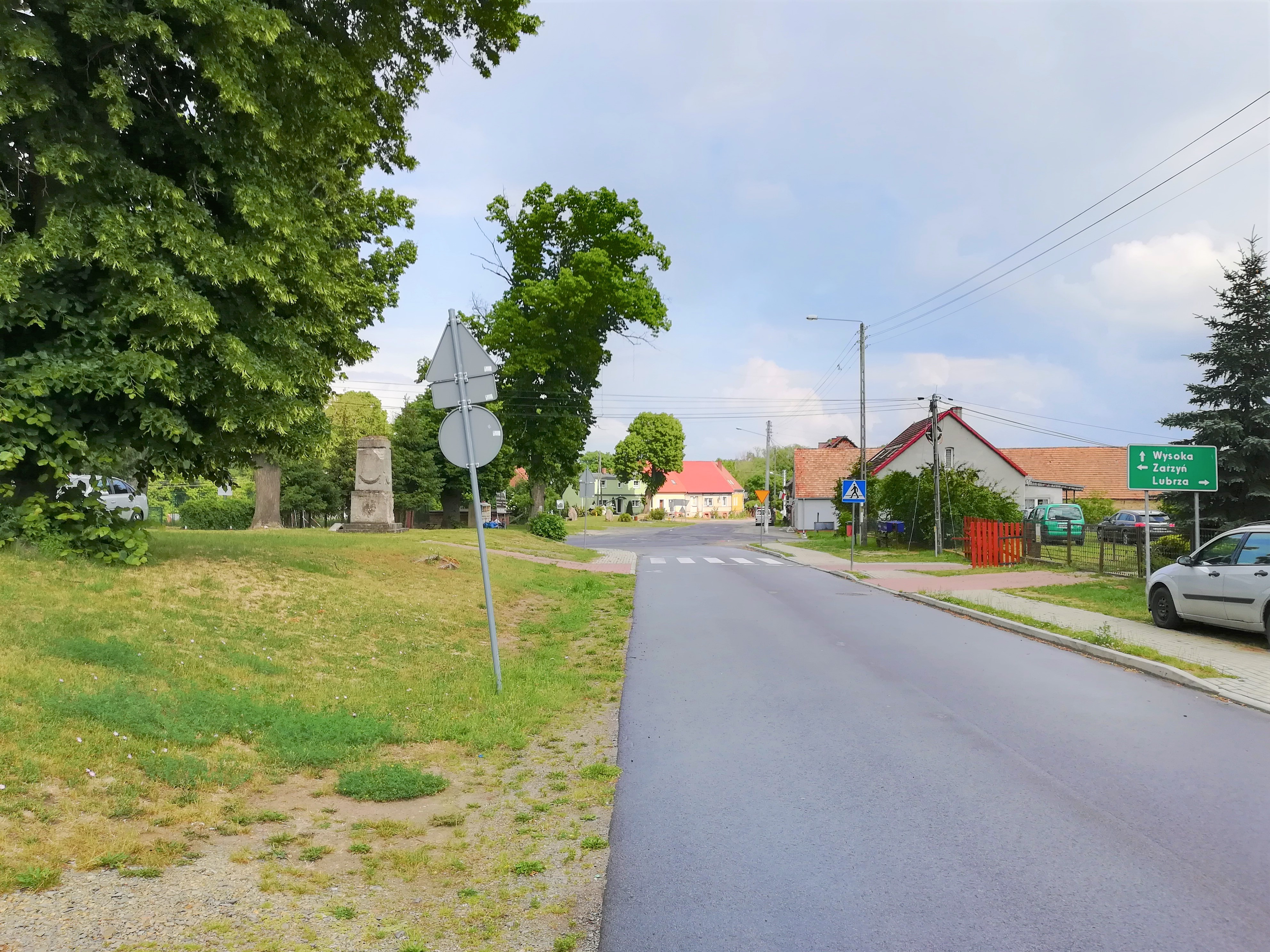 Centrum wsi Boryszyn.